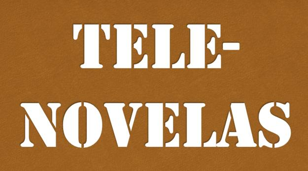 Telenovelas.